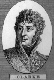 Général_Henri_Jacques_Guillaume_Clarke